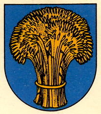 Dombresson Wappen Kanton Neuenburg Schweiz